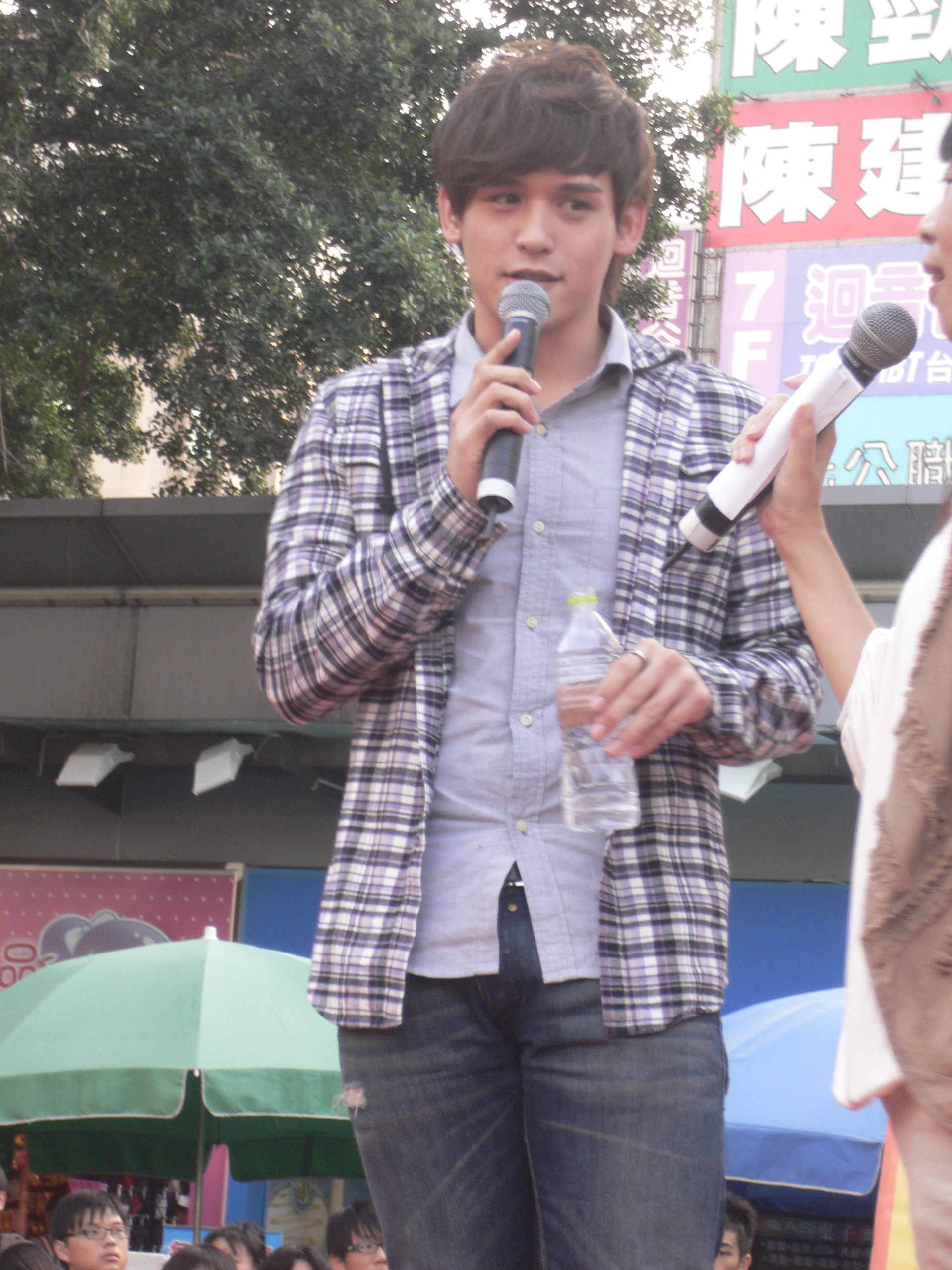 中文（台灣）: 倪安東在《第一課》的台南簽唱會Bân-lâm-gú: Gê An-tong tsāi Tē-1-khò ê Tâi-lâm tshiam-tshiùnn-huē.